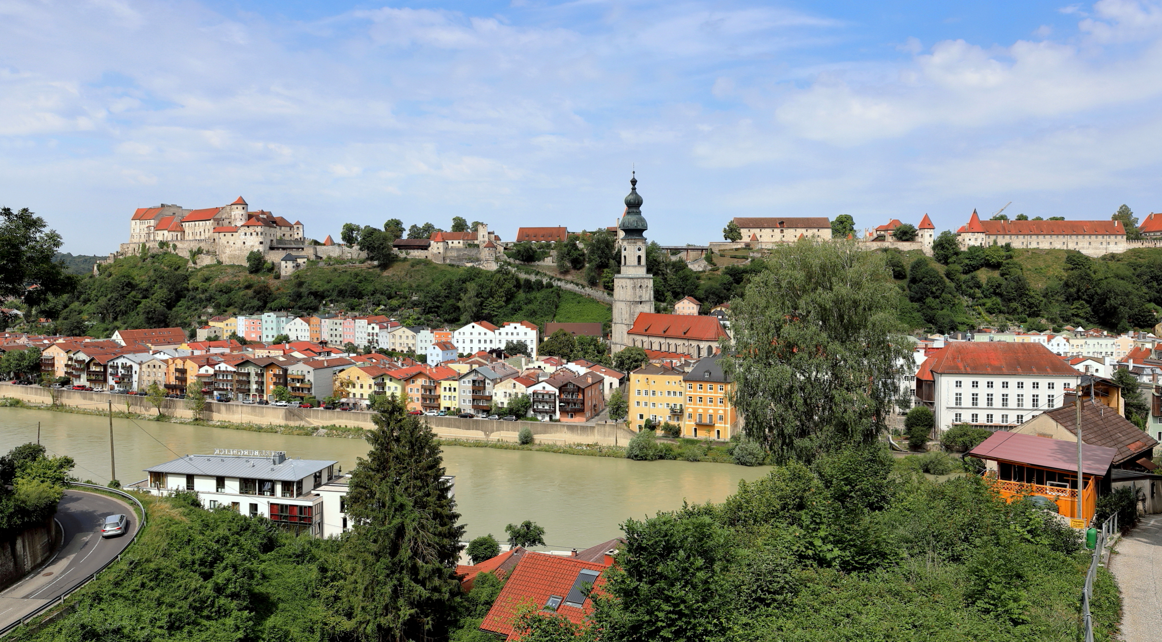 Ostansicht der Altstadt der deutschen Herzogstadt Burghausen im oberbayerischen Landkreis Altötting.